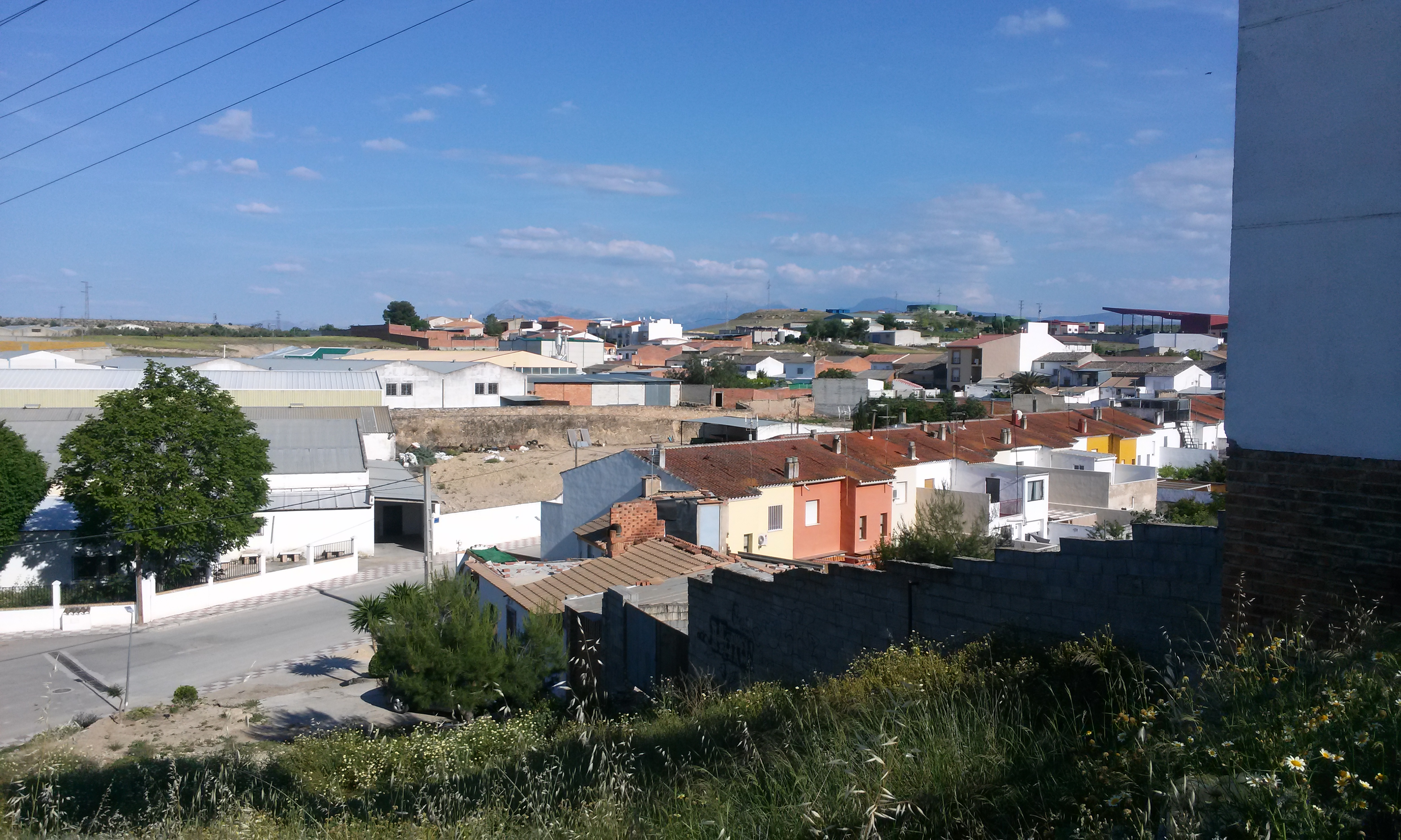 Vista del pueblo de Villargordo.